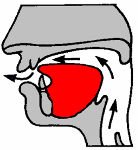 Dental in der Phonetik